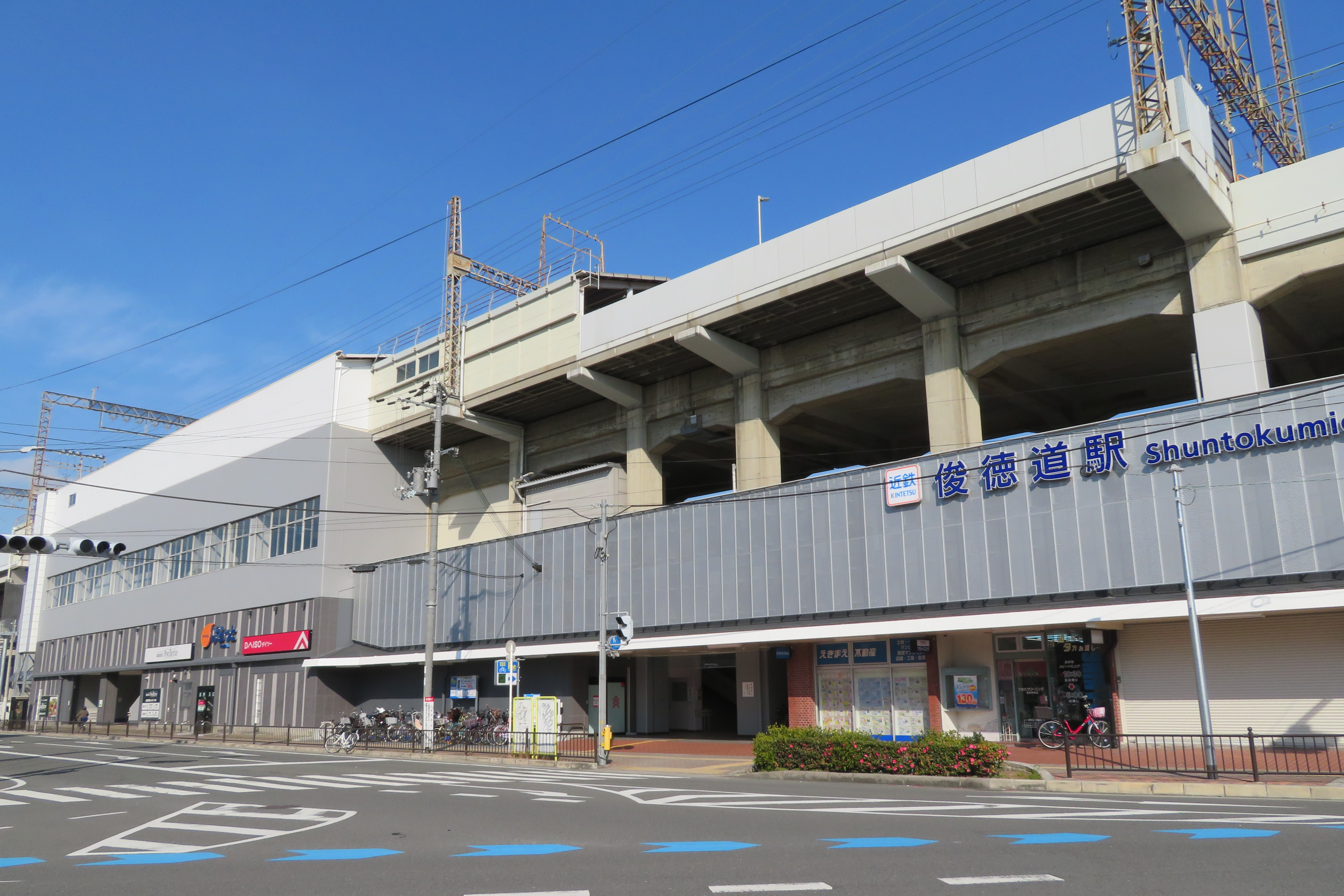 近鉄俊徳道駅